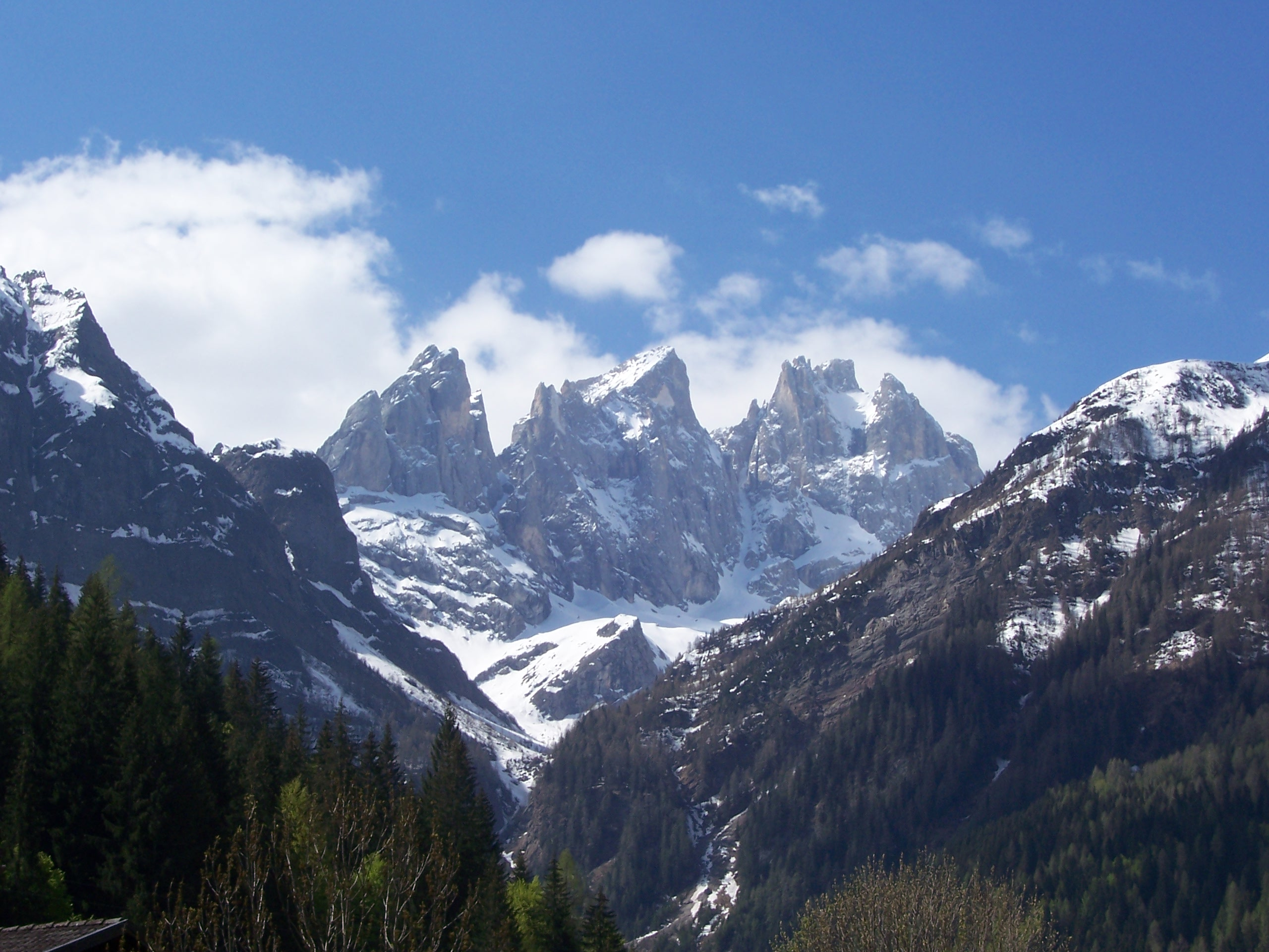 Focobon, Falcade (BL)